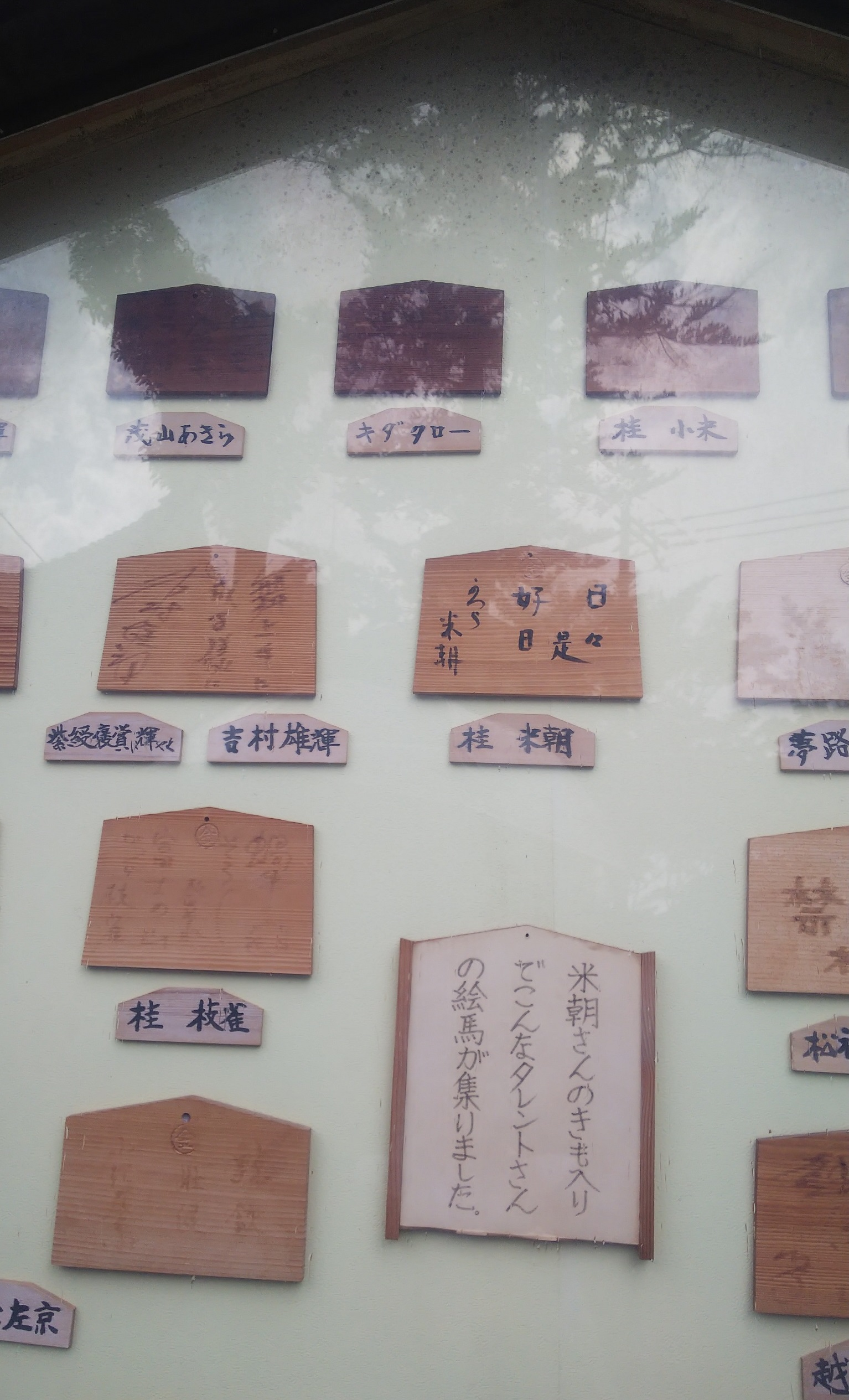 境内に展示されている桂米朝の絵馬